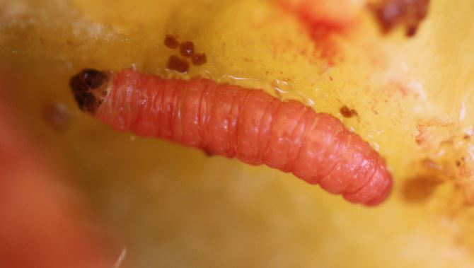 Raupe des Pflaumenwicklers (Grapholita funebrana)